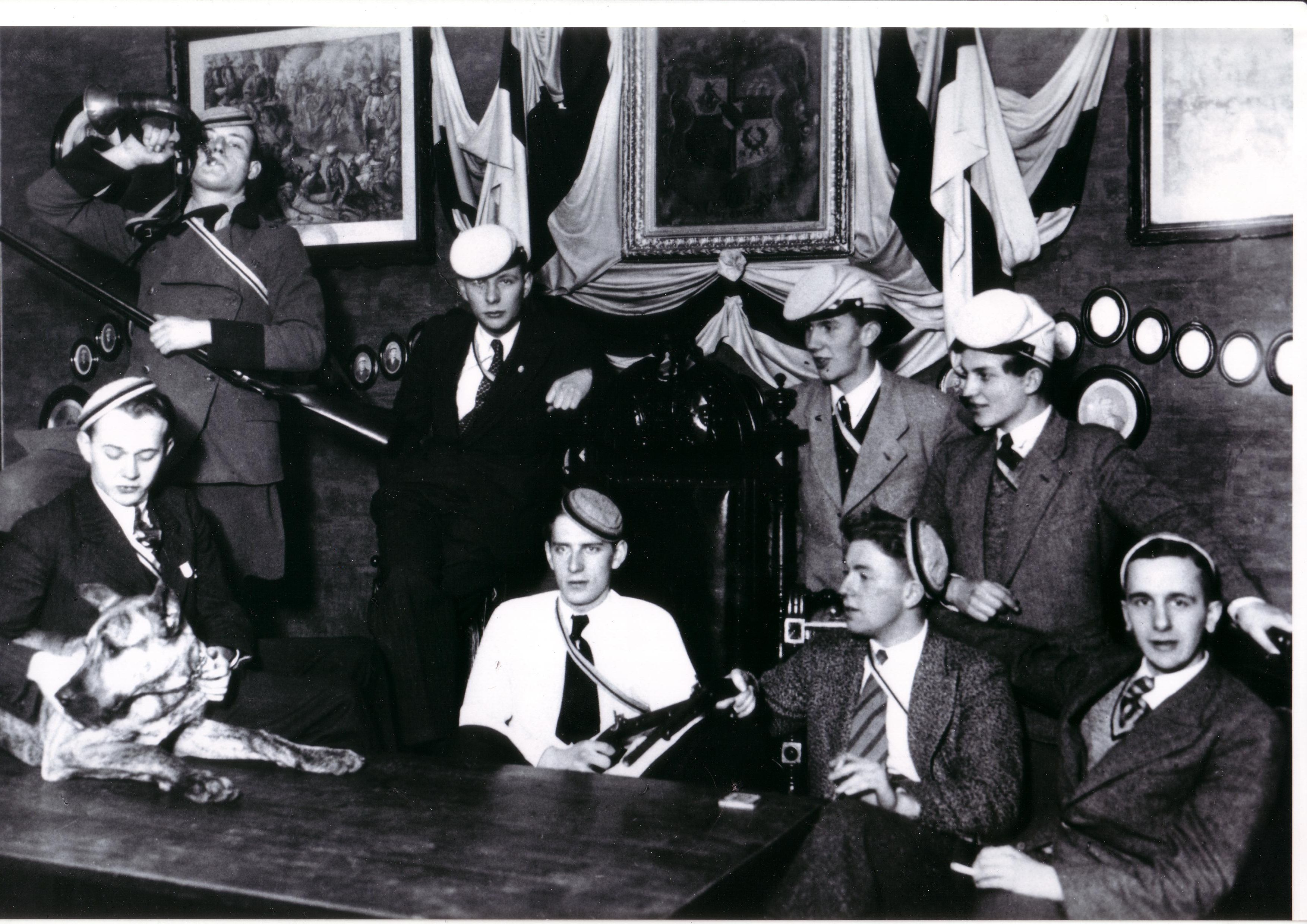 Fotografie der Königsberger Balten am 30. Januar 1934. Oben: Georg Reinke, Albrecht von Bremen und die Füchse Beermann und Mark-Wolfram von Schickfus und Neudorff. Unten: Peter Stendel mit dem Corpshund „Firks“, Hans-Wolfram Knaak, Richard Kirschstein-Freund und Conkneipant Borkowski